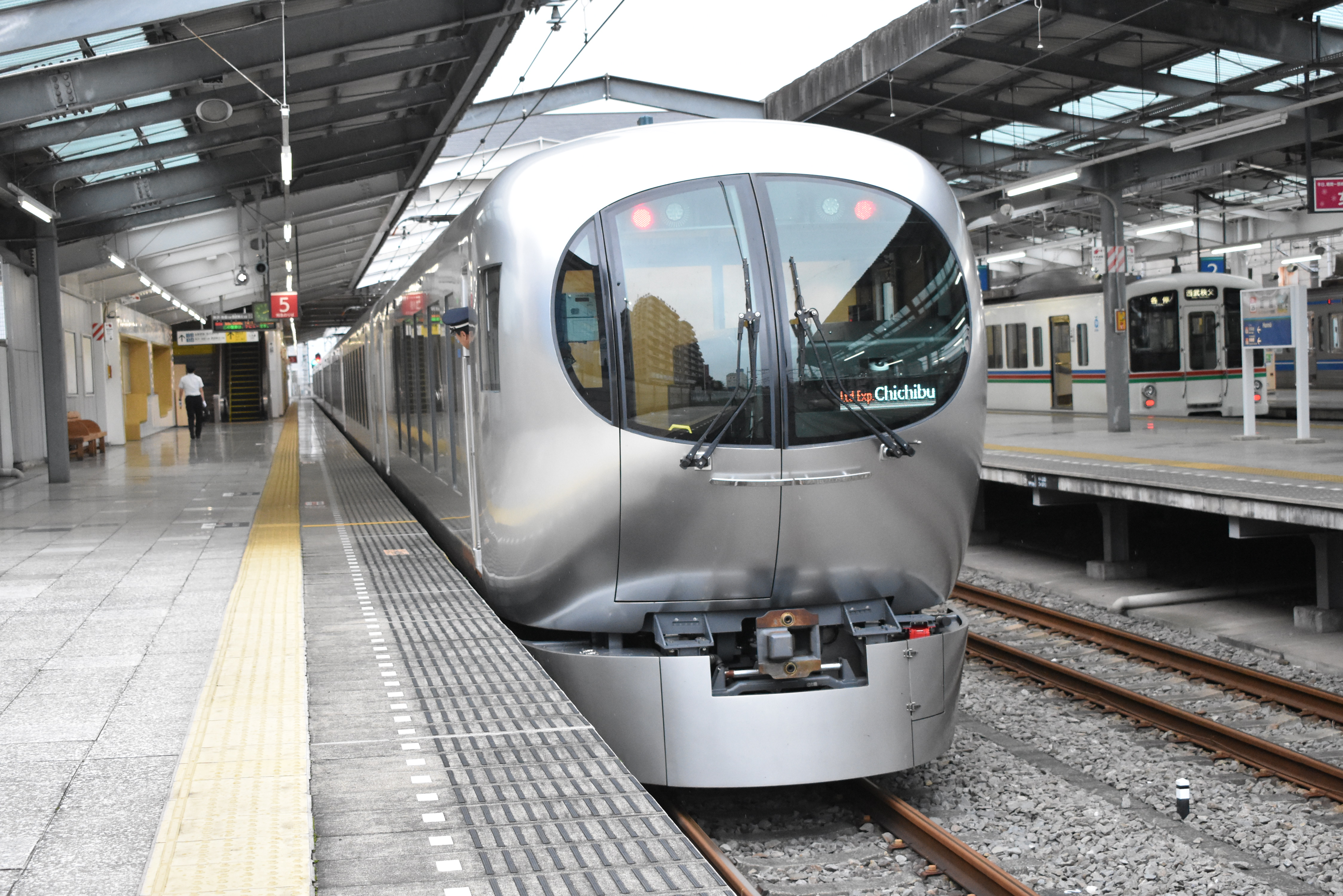 西武001系電車